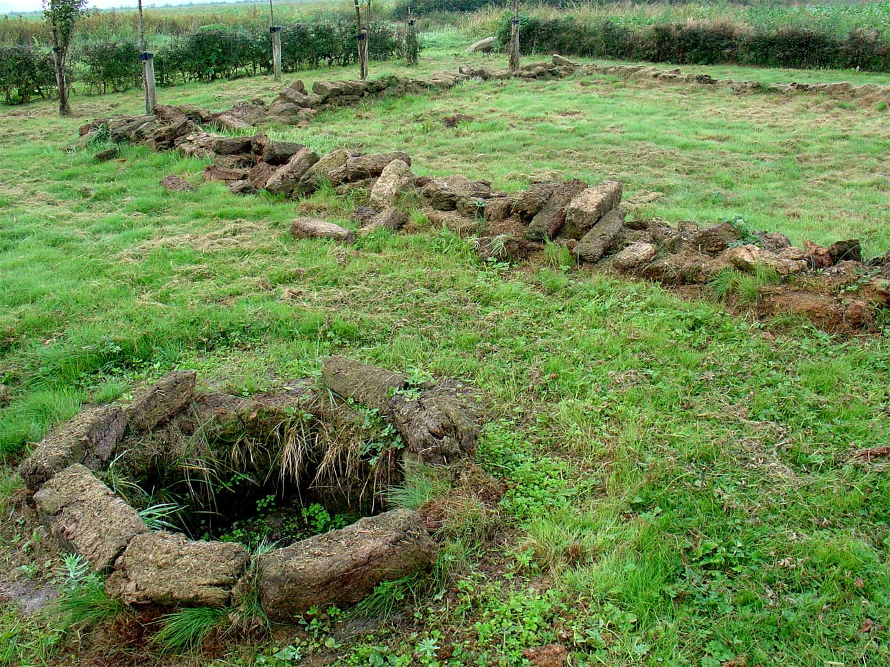 "Huisplaats" bij de Runde, een kunstzinnige herinnering aan de vroegere bewoning van het gebied door veenarbeiders